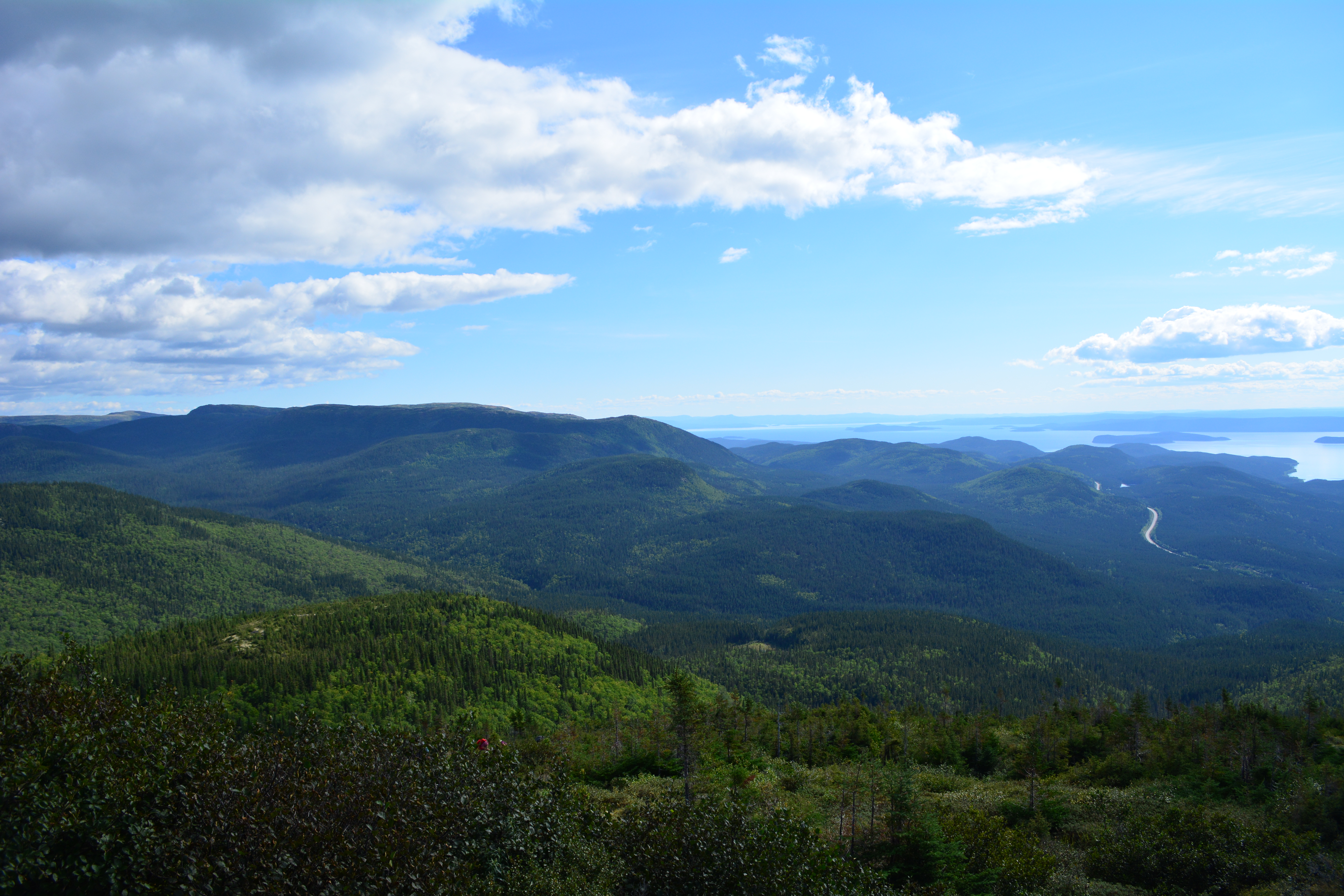 Relief vu à partir du mont Harfang dans les monts Groulx